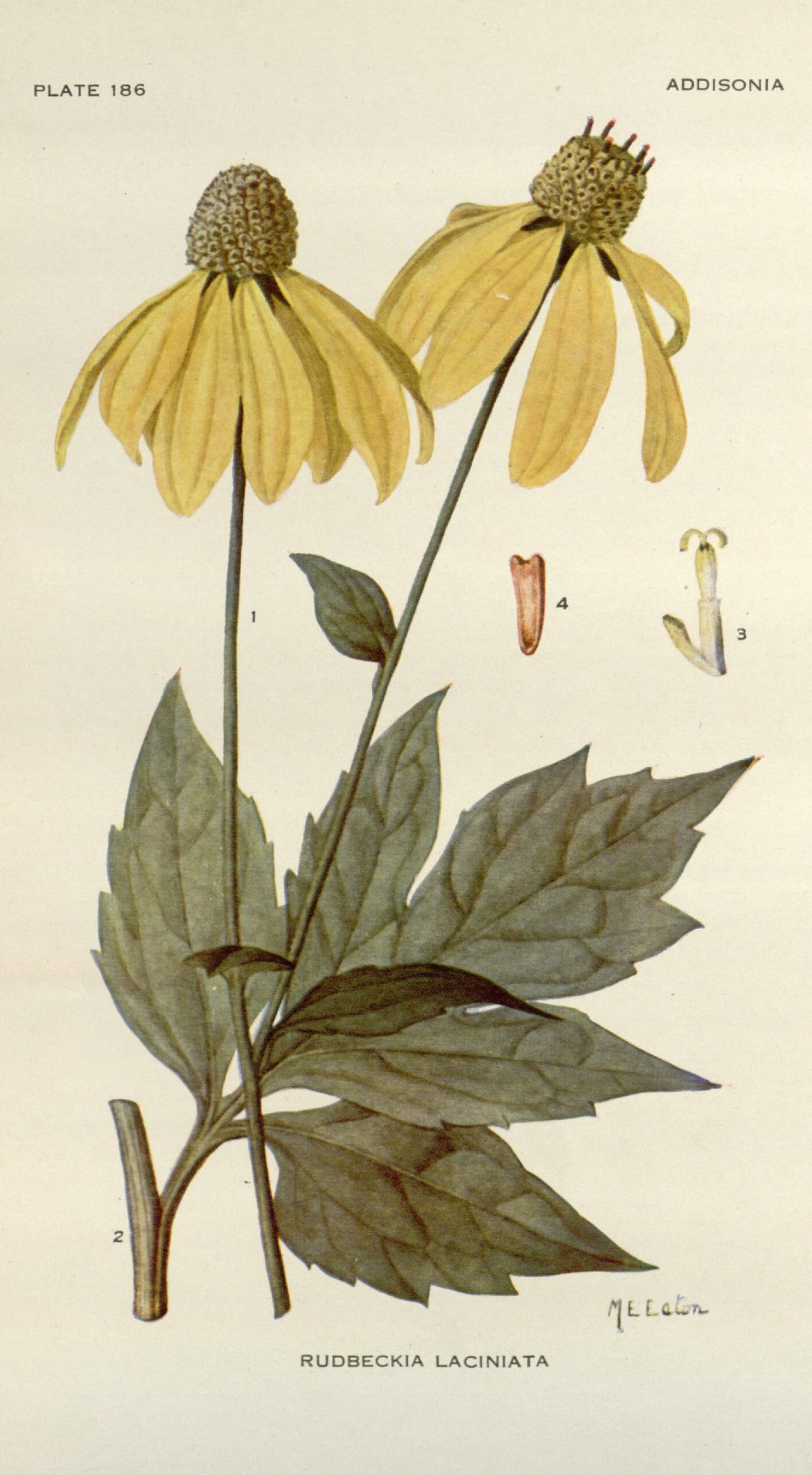 Legende: 1 Oberer Teil der Pflanze. 2 Unteres Stängelblatt. 3 Röhrenblüte mit Spreublatt. 4 Frucht.